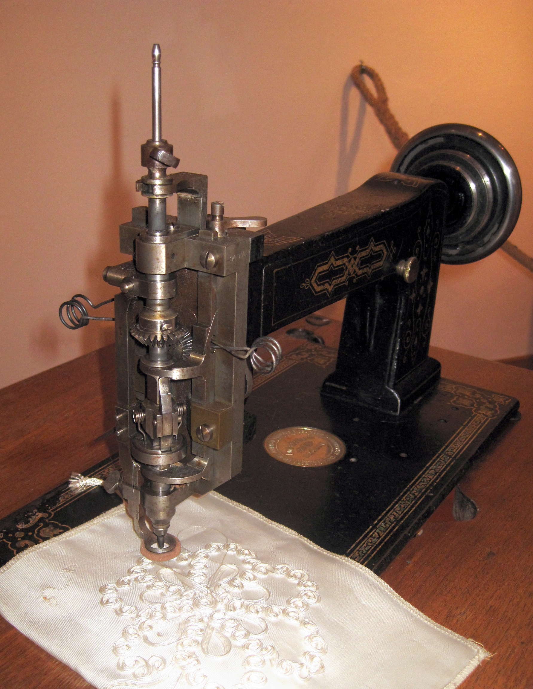 Kurbelstickmaschine um 1895 (Modell A) des Herstellers Lintz & Eckhardt, Berlin auf einer Nähmaschinenausstellung im Januar 2015 im Stadtmuseum Iserlohn (Haus der Heimat), Fritz-Kühn-Platz 1 in Iserlohn.